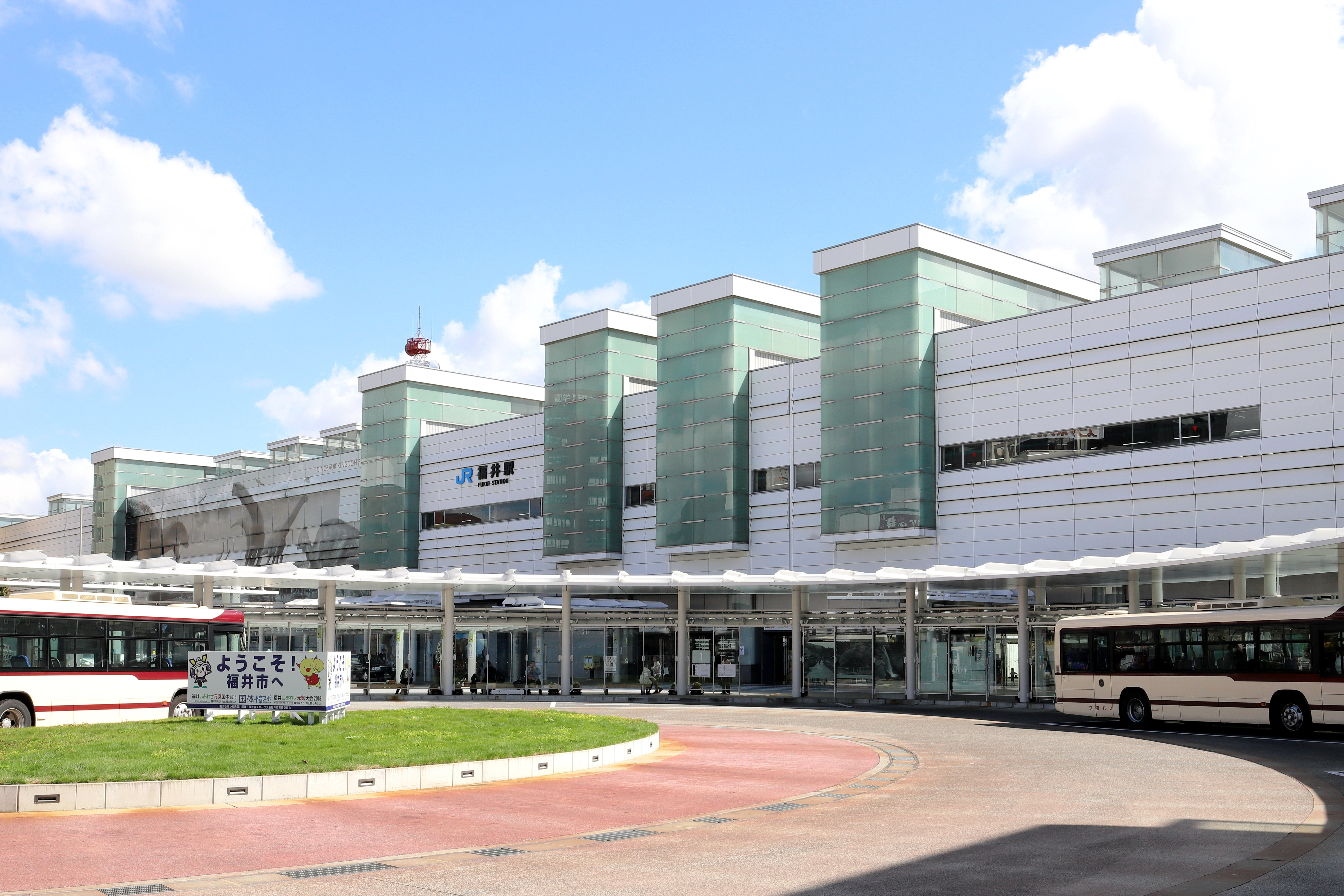 バスのりば開業後のJR福井駅西口（2018年9月）